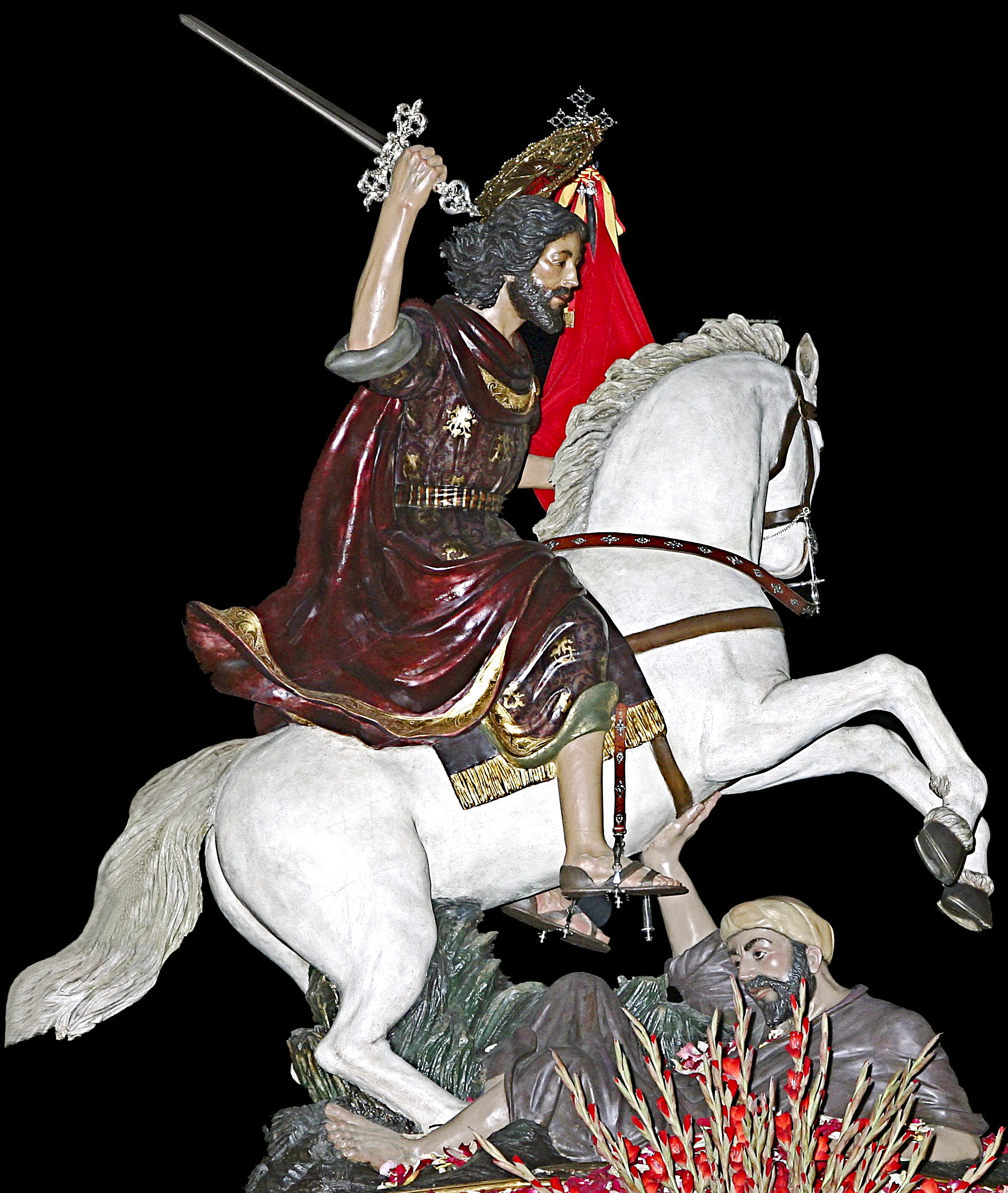 Imagen del Apóstol Santiago ecuestre tallada por Castillo Lastrucci para la Hermandad de Santiago de Aznalcázar (Sevilla) en 1944. Sustituye a la anterior, perdida en 1932.